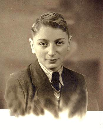 Einer der 14 deportierten und ermordeten jüdischen Schülerinnen und Schüler der Quäkerschule Eerde.